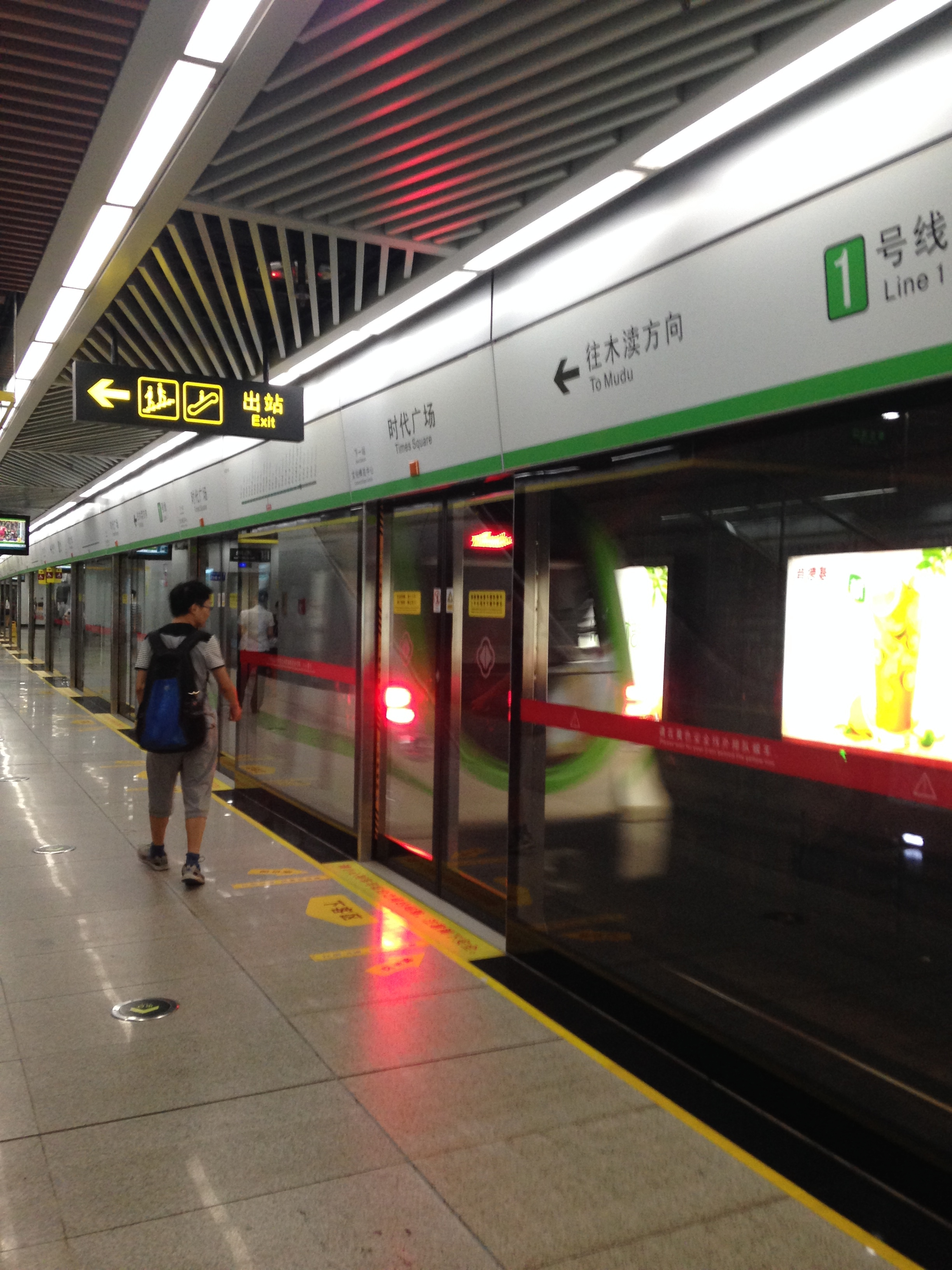 時代広場駅のホーム